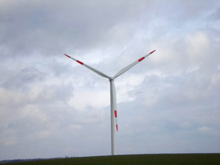 Windrad, Senvion MM92 bei Frankenhardt-Honhardt